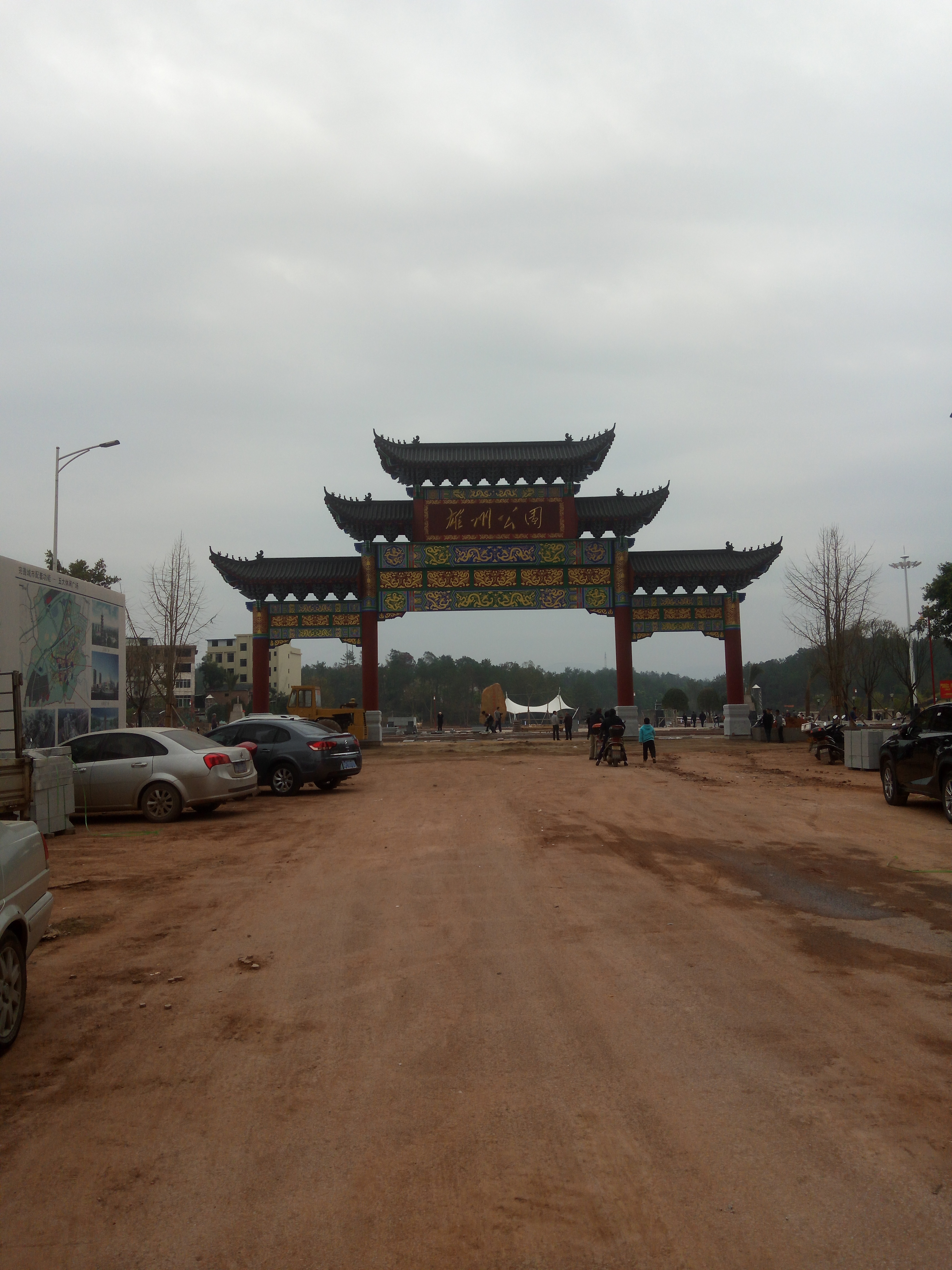 南雄市雄州公园